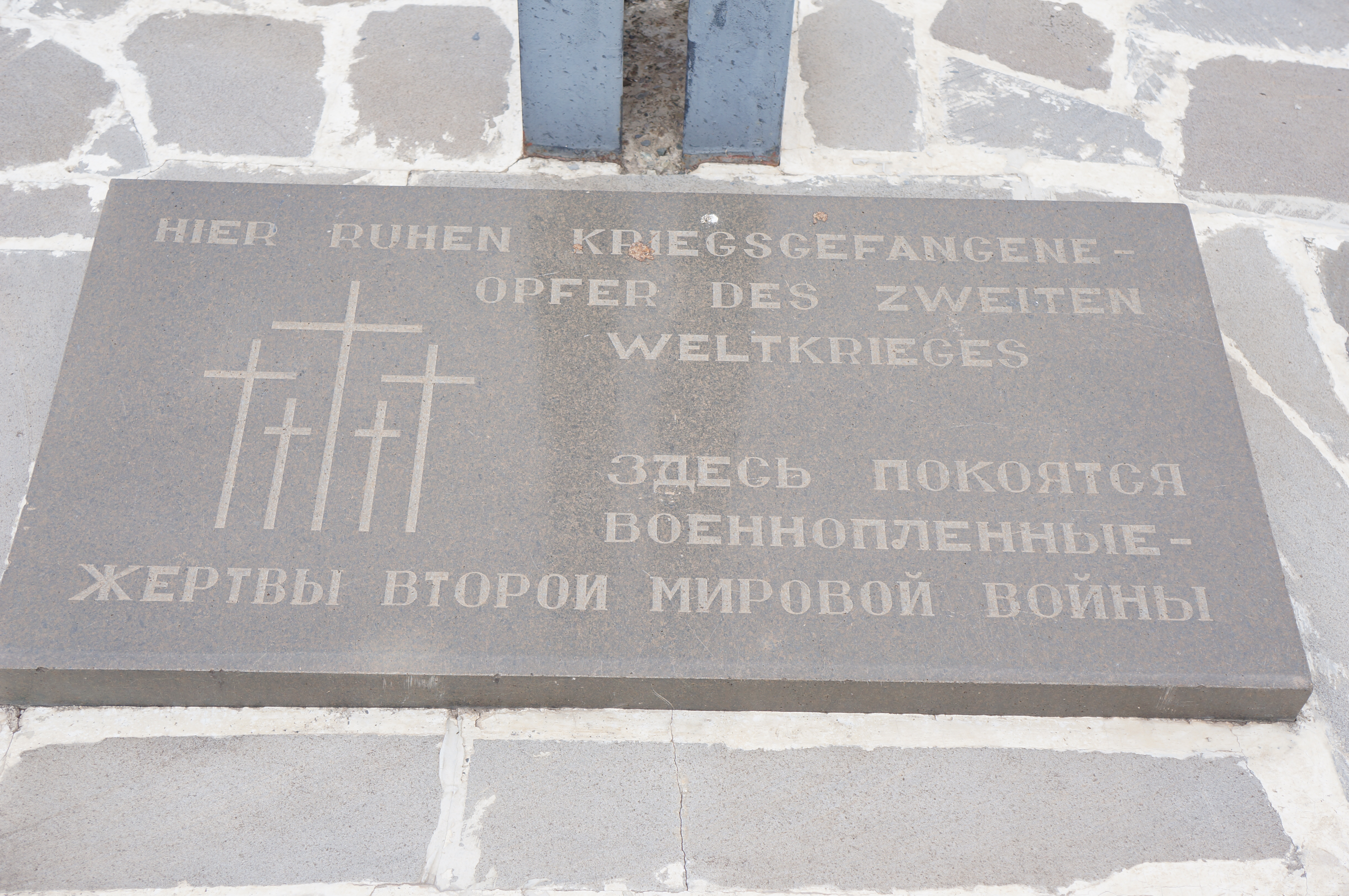 ընդգրկում է քաղաքի պատմական միջուկը 1/4